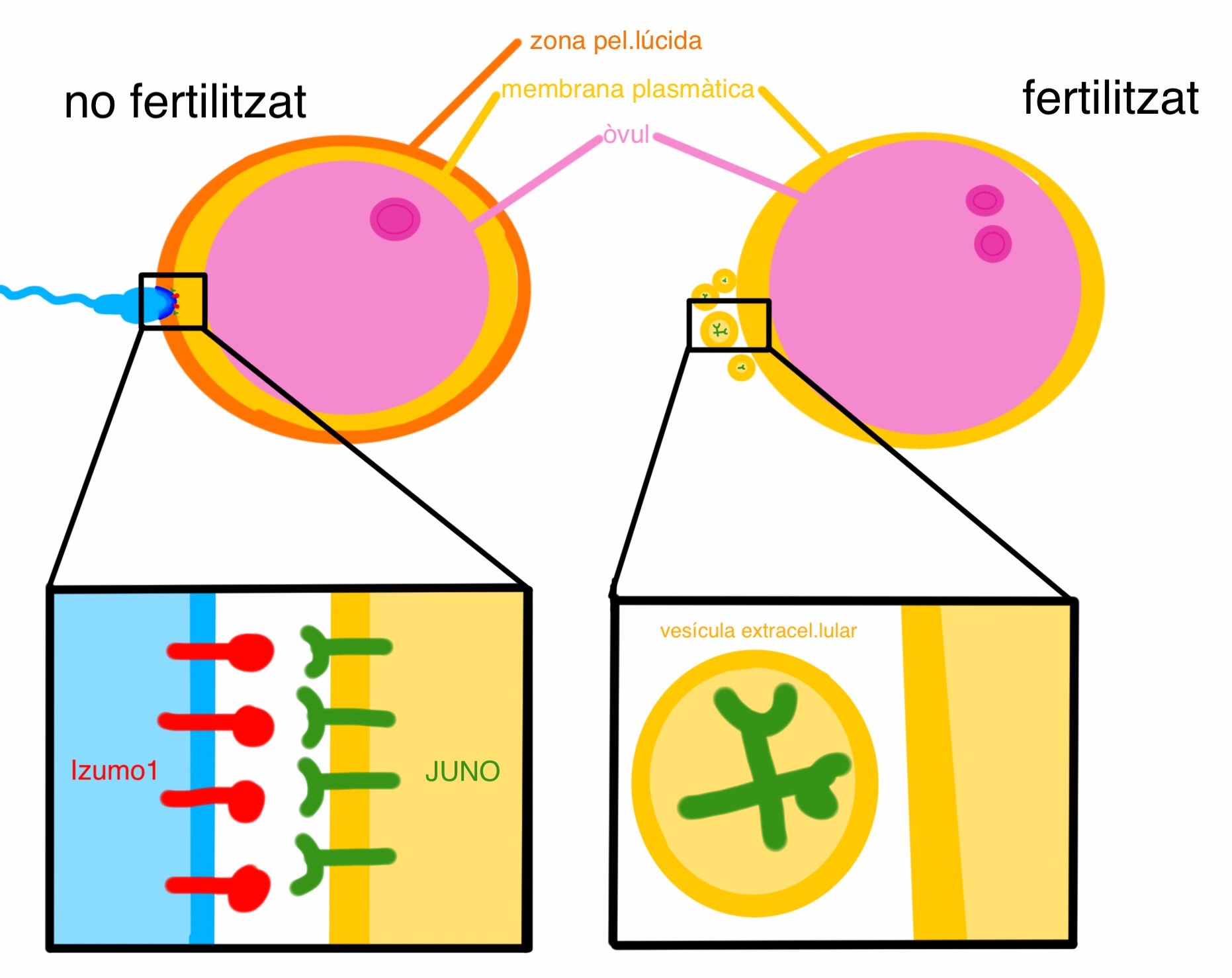 Receptor de JUNO surten en vesicules secretores